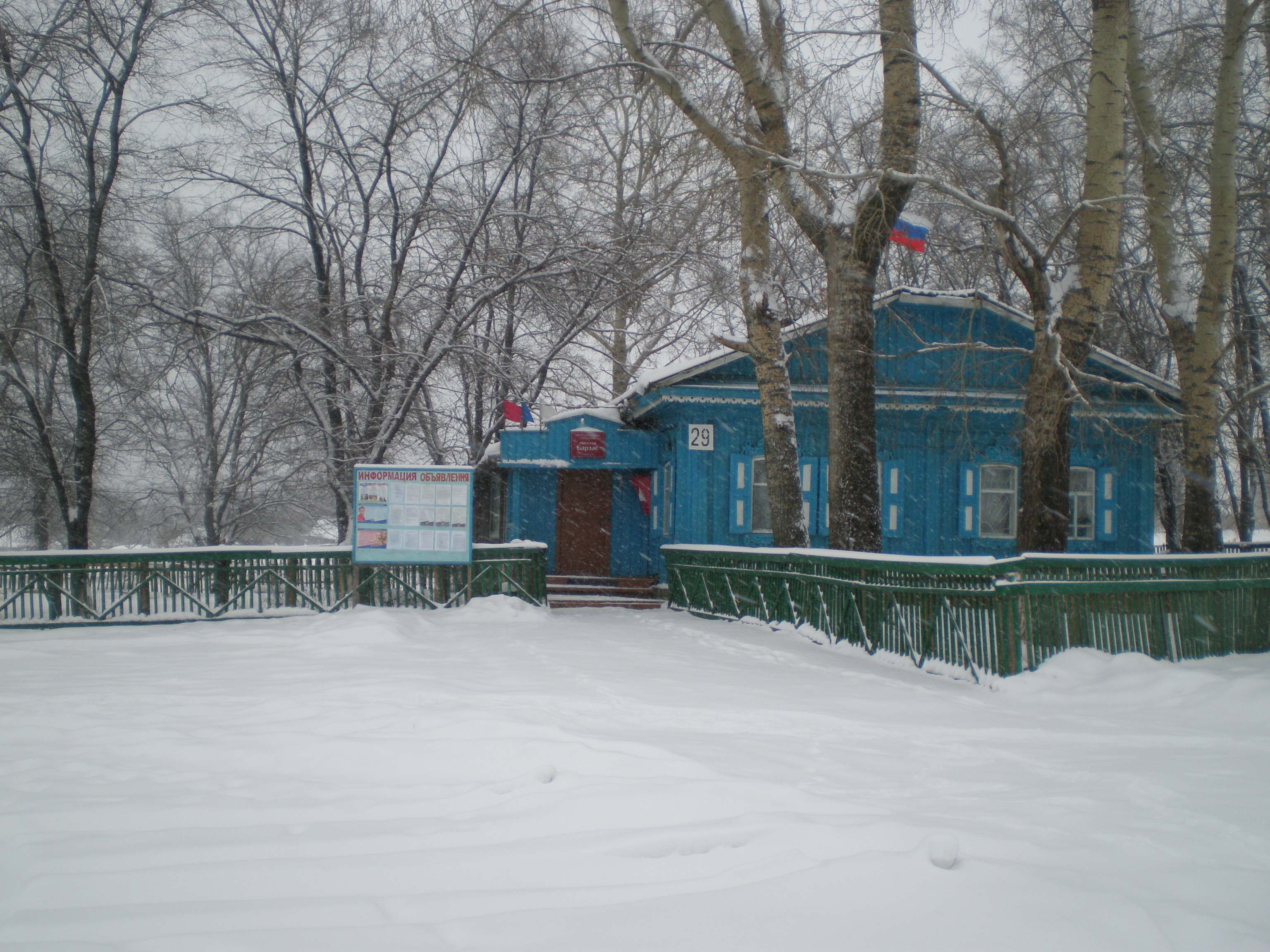 Здание поселковой администрации